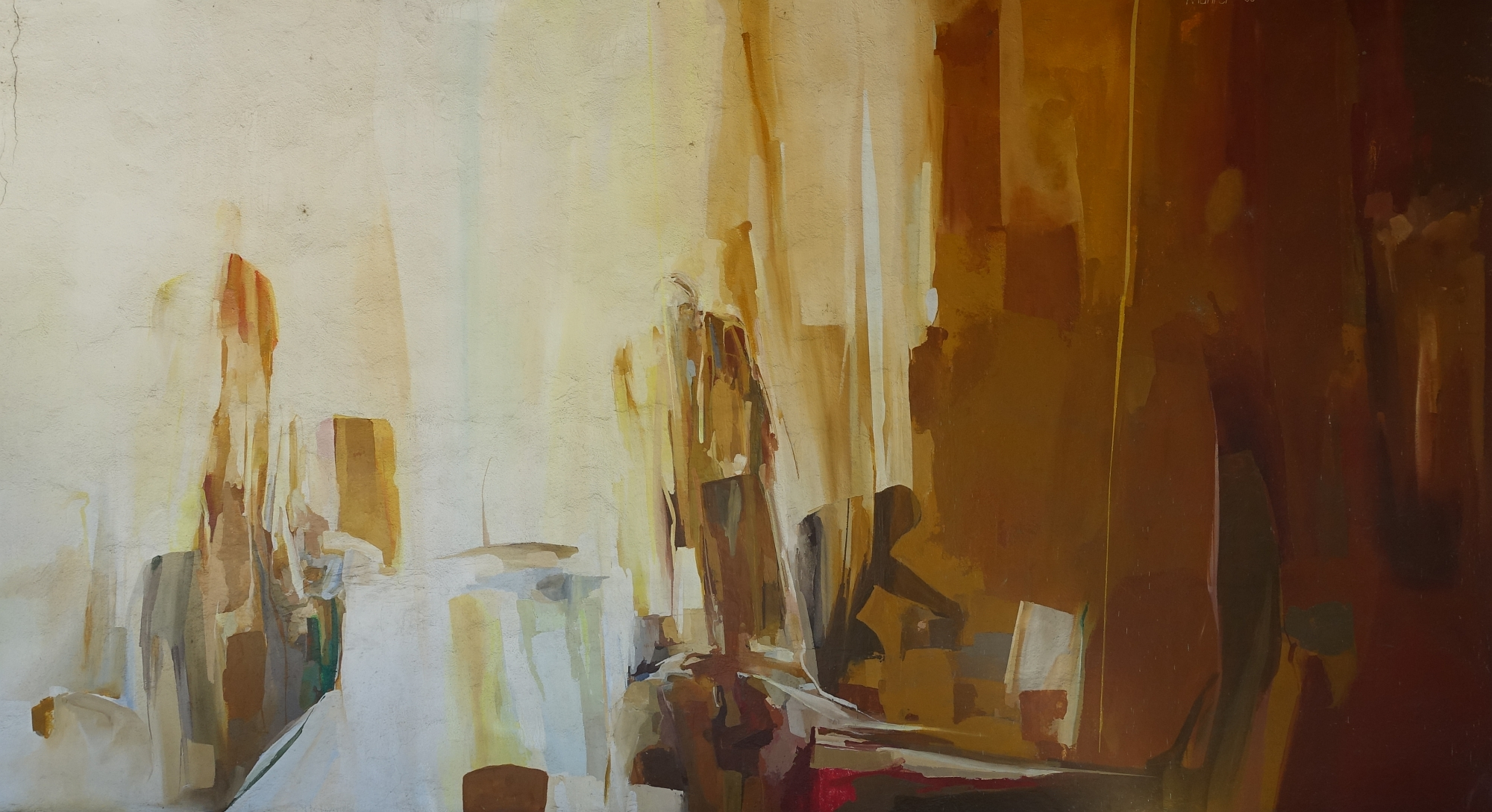 Wandbild, 1968, Die Talente. Friedhof Aesch (BL). Von Helmuth Mahrer (1934-1995) Maler